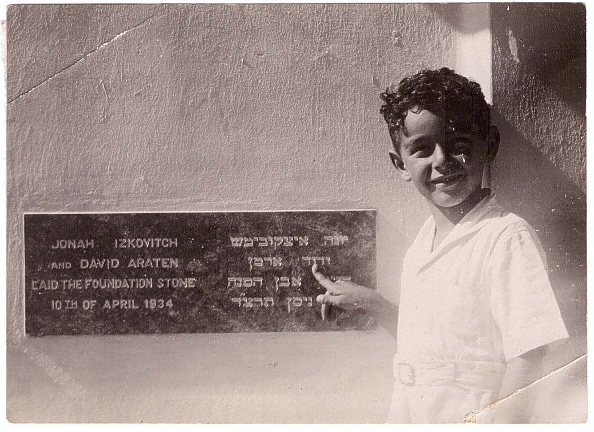 דוד ארטן עומד ליד השלט לציון הנחת אבן הפינה לחב׳ פרוטרום 10.04.34